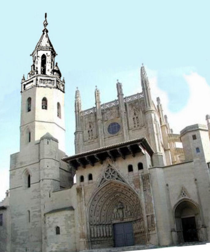 Catedral de Huesca. Reconstrucción idealizada de la torre y chapitel.